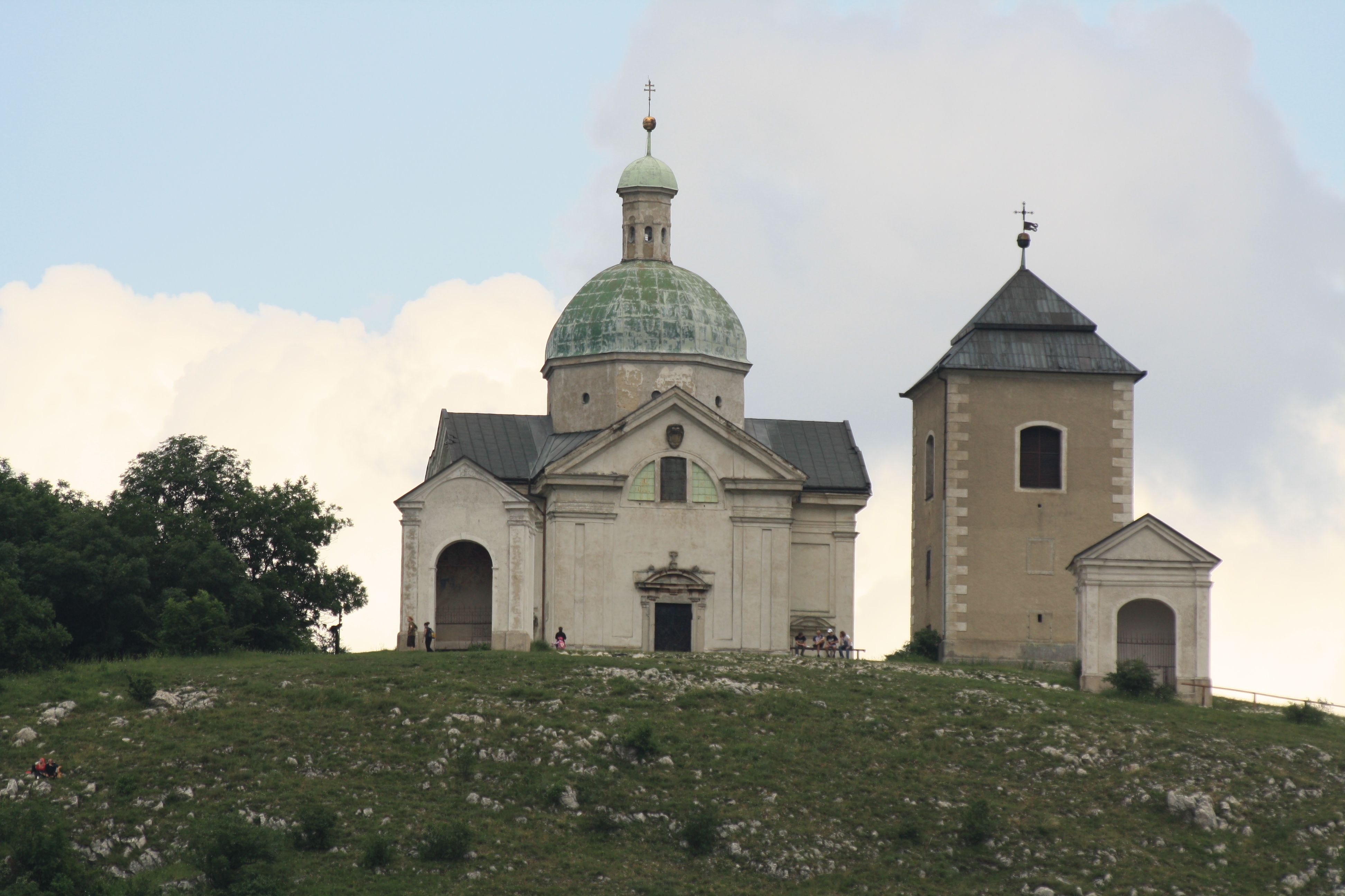 Blick auf den von Mikulov